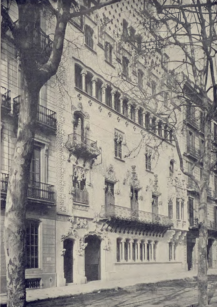 Casa Amatller (Barcelona, Catalunya), obra de Puig i Cadafalch, el 1900